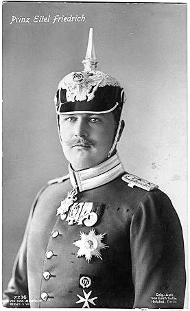 Prinz Eitel Friedrich von Preußen in Uniform des 1. Preußischen 1st Regiments